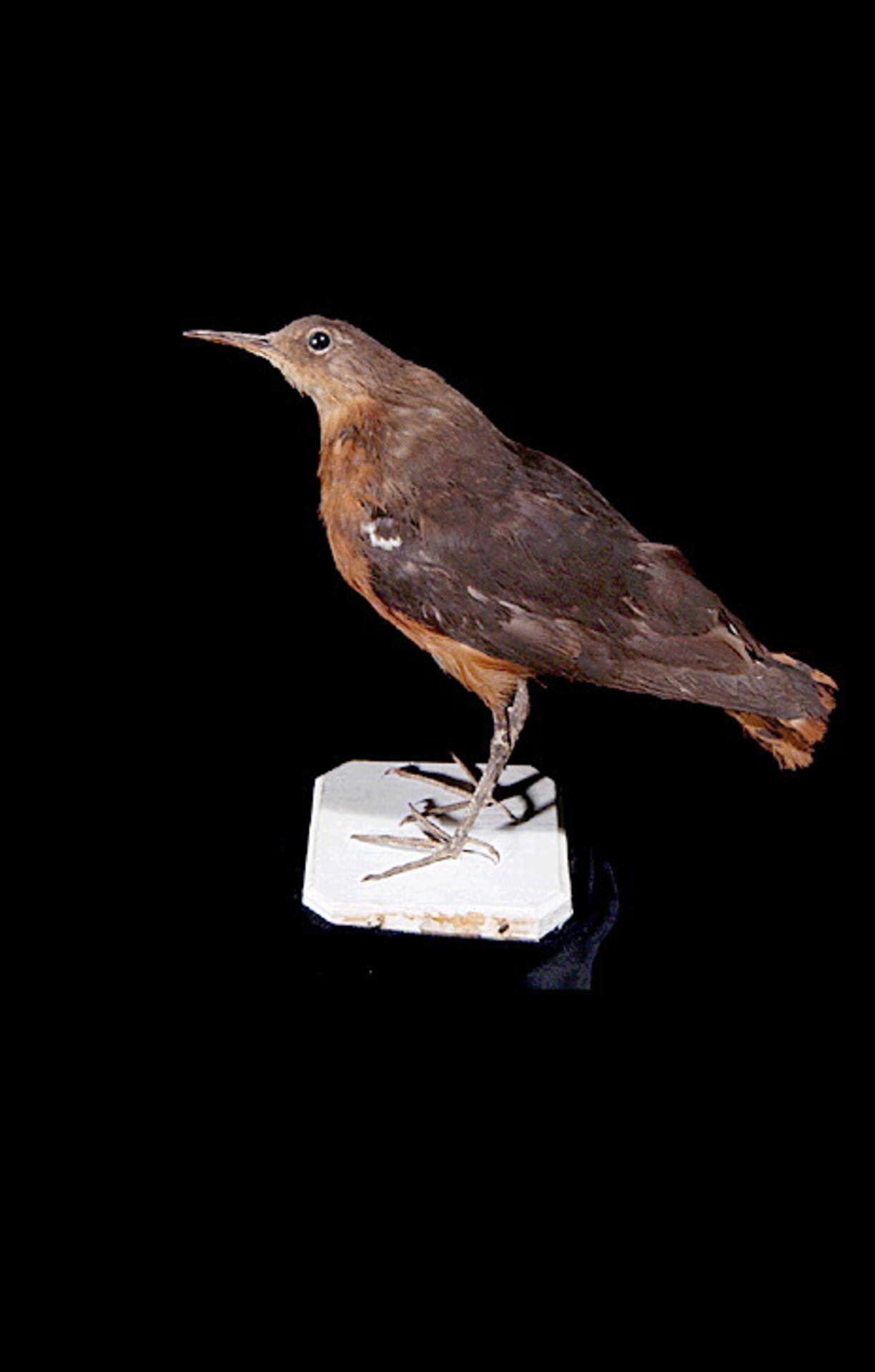 Prosobonia leucoptera (Gmelin, 1789)